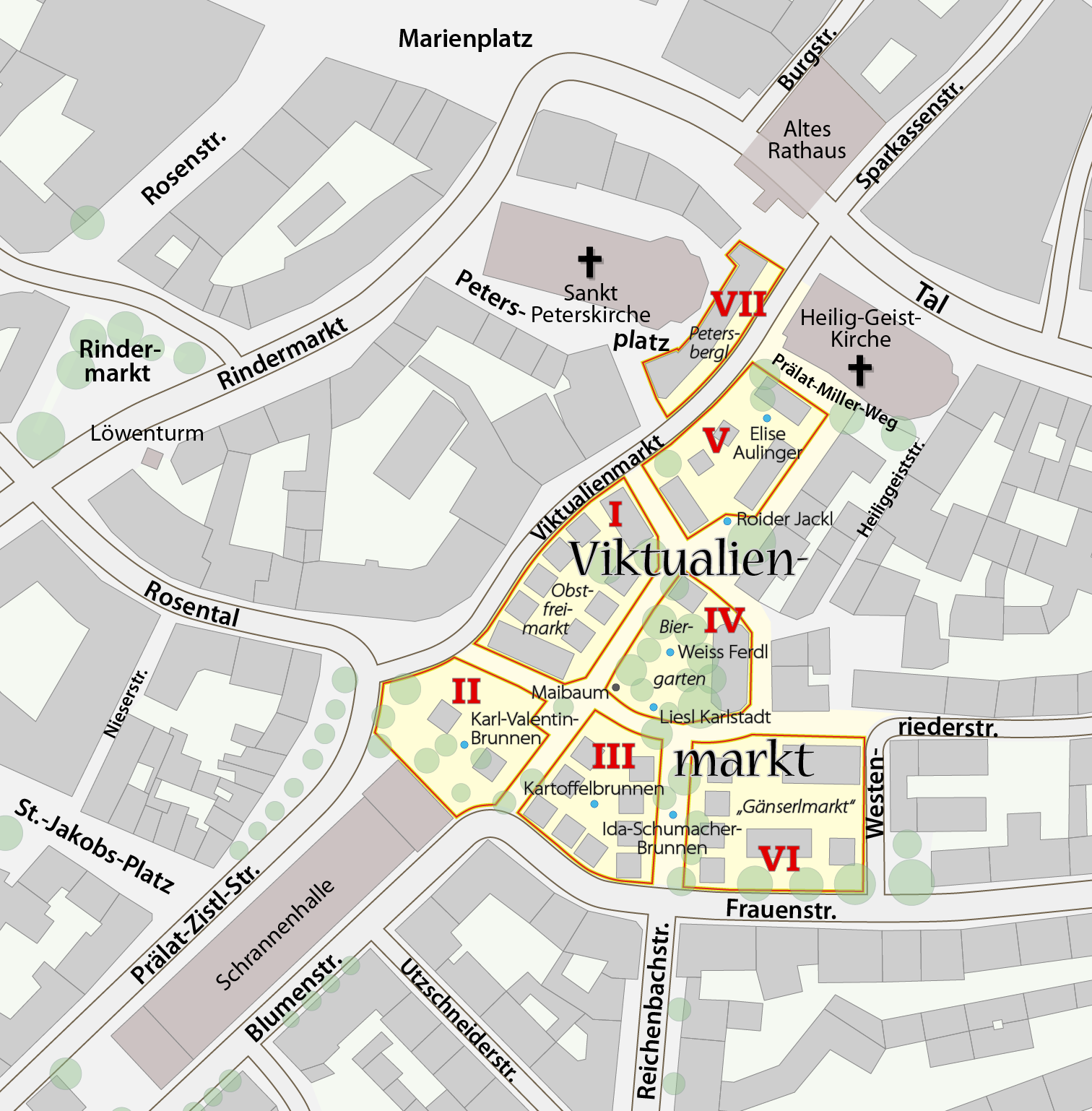 Plan des Viktualienmarkts in München